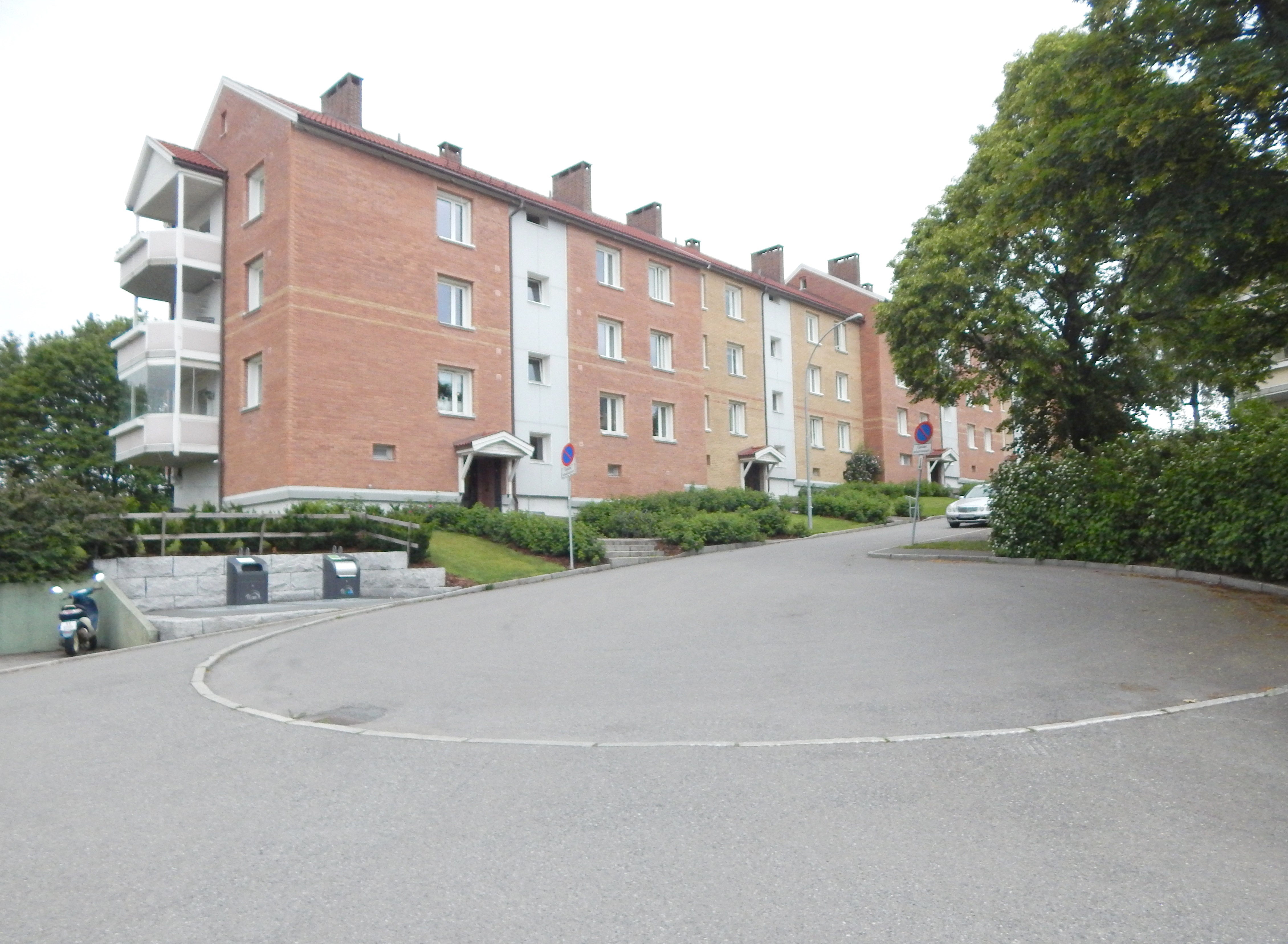 Lillebergsvingen